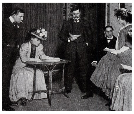 Répétition au théâtre du Gymnase à Paris de la pièce de Jehanne d'Orliac "Joujou tragique" en septembre 1907.